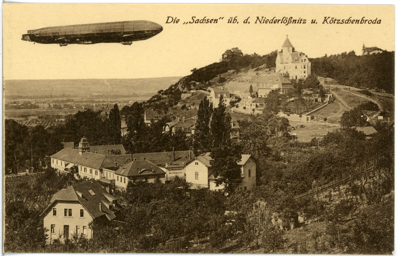 Radebeul; Luftschiff Sachsen über Kötzschenbroda This postcard is from publisher Brück & Sohn in Meißen ( postcard has a unique number 17929 and is available in a higher resolution at the publisher. This images was uploaded in a cooperation project between Wikipedians and the publisher.